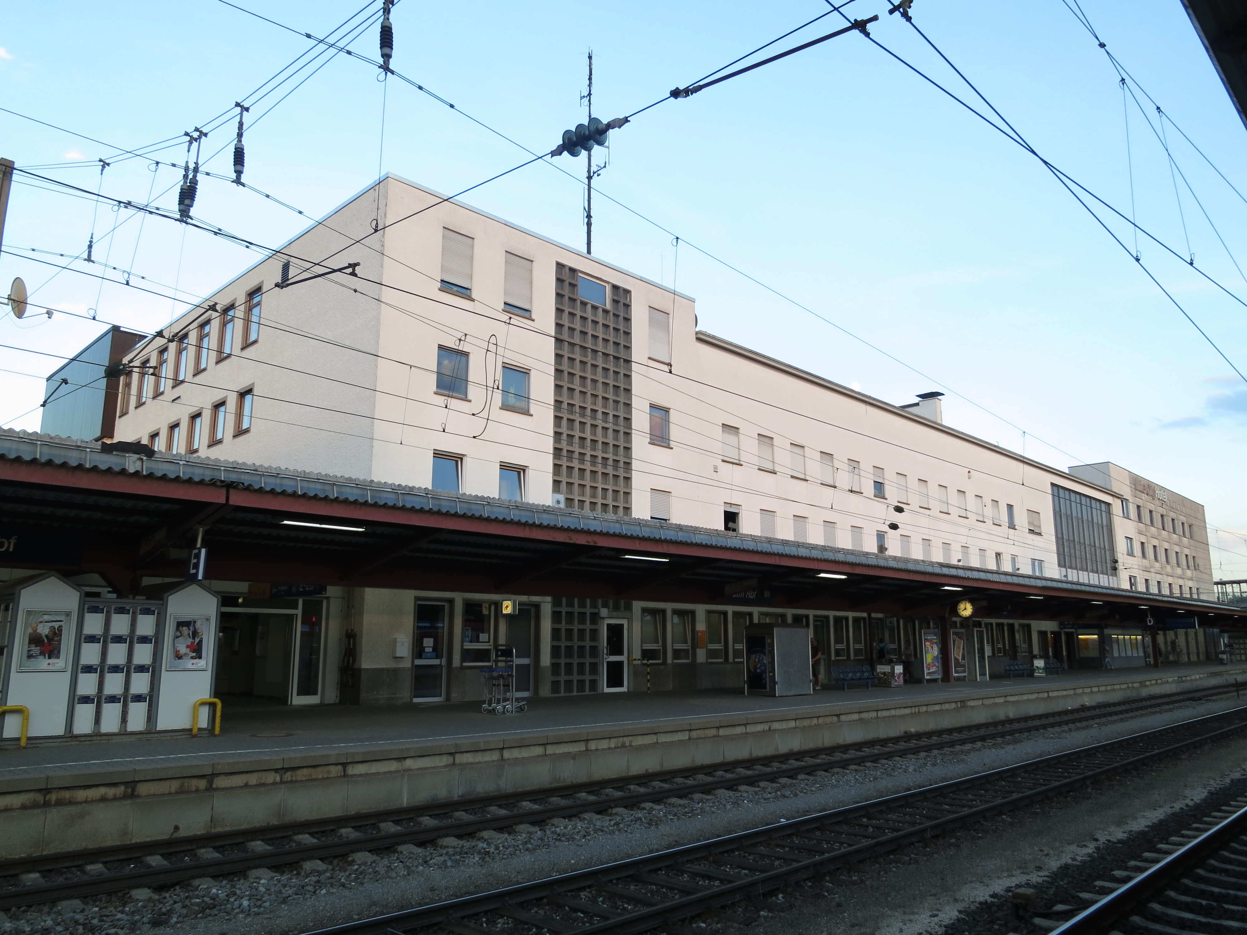 Empfangsgebäude des Ulmer Hauptbahnhofs von der Gleisseite (2013)